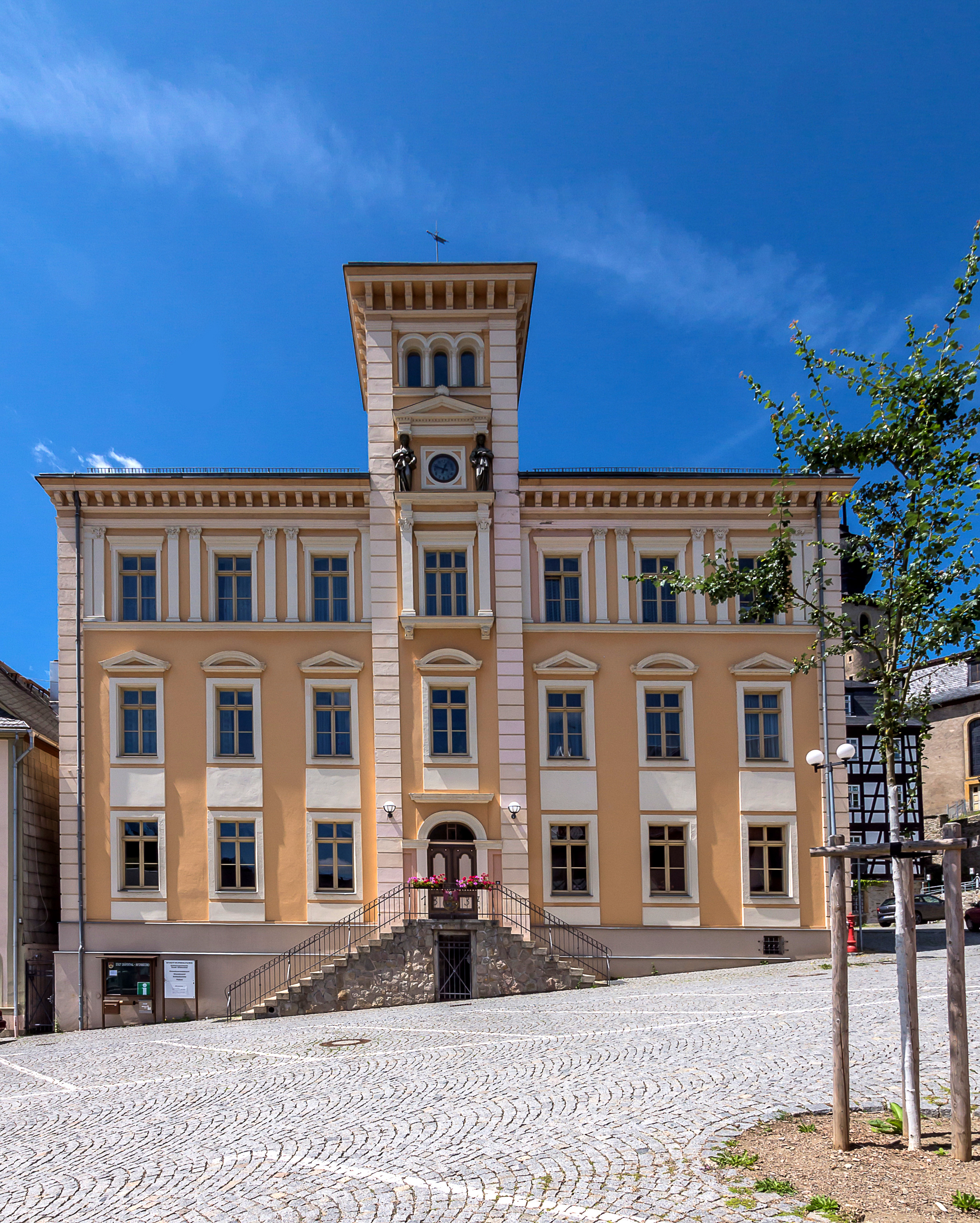 Gräfenthal Marktplatz Rathaus